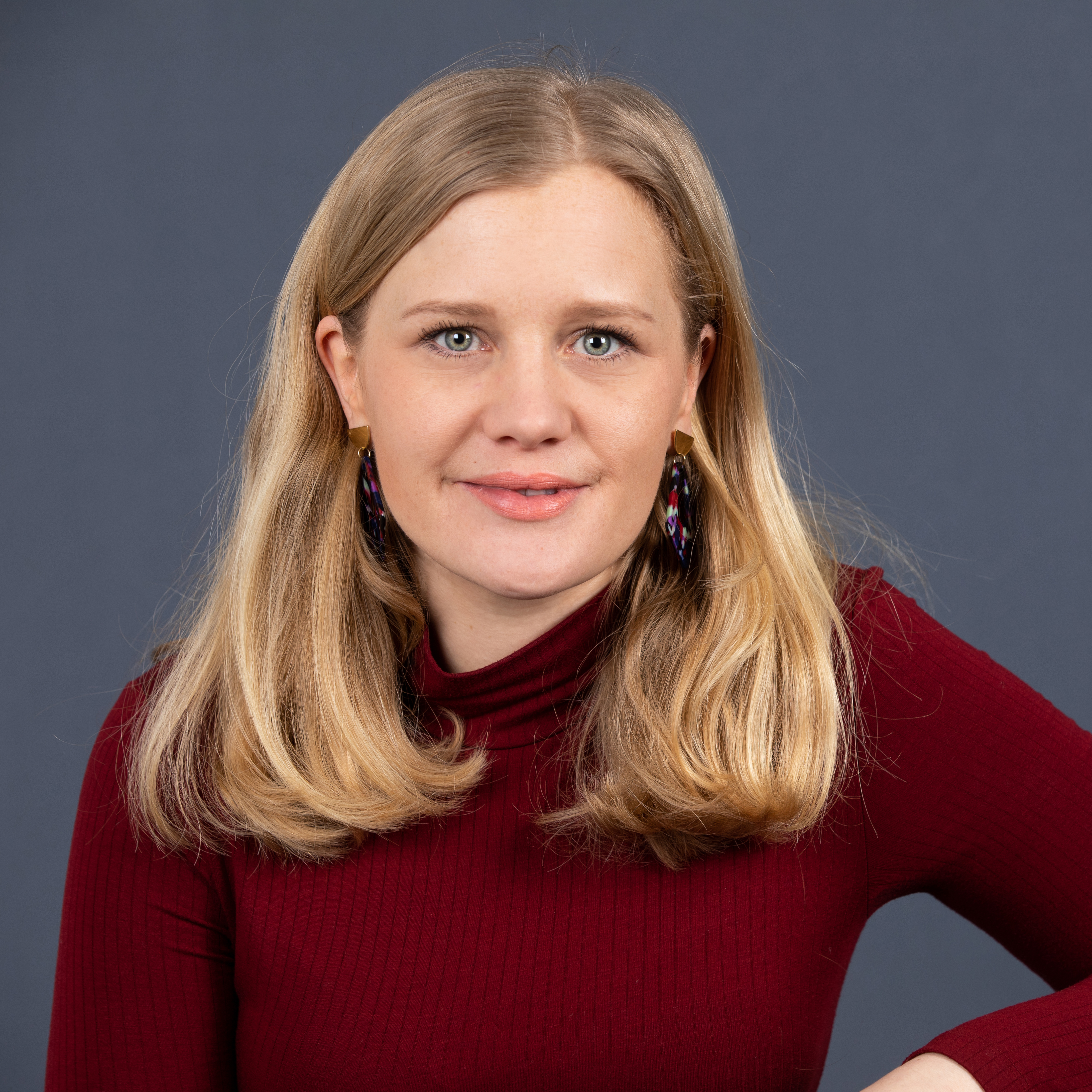 Josephine Ortleb (SPD)